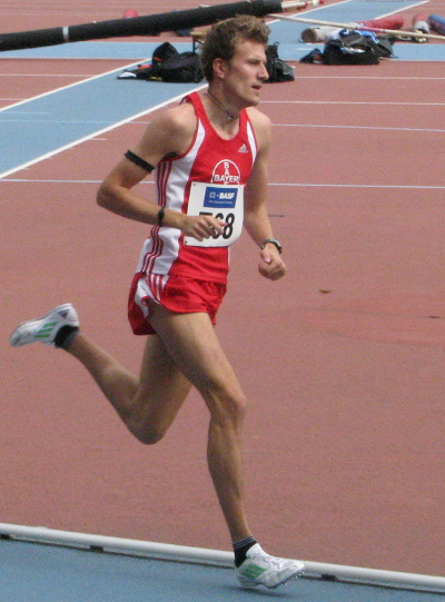 Robin Schembera beim DLV WM-Testwettkampf 2011 im Stadion der MTG Mannheim.